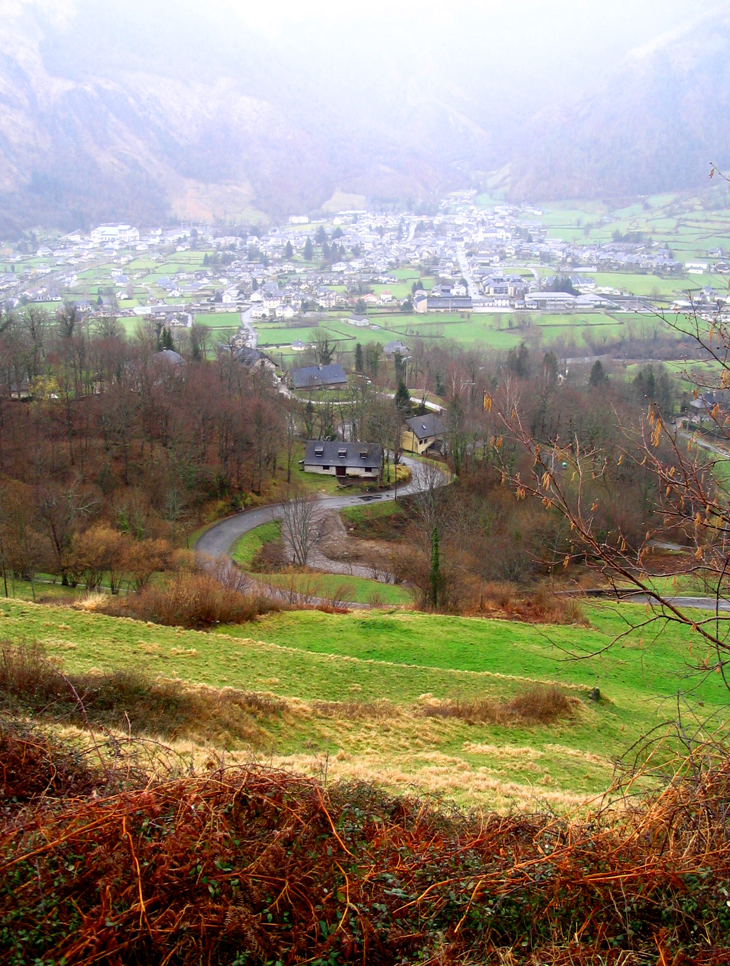 Village de Laruns - Vallée d'Ossau - Pyrénées Atlantiques - France Auteur: P.Charpiat 2007